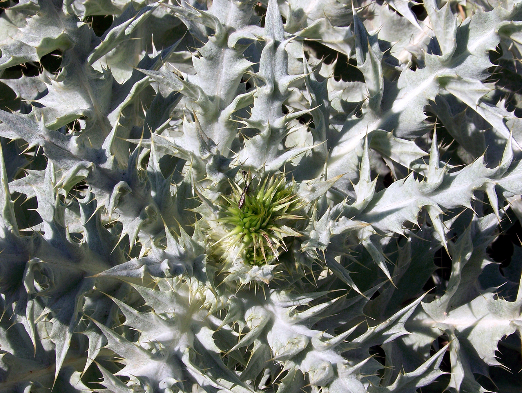 Onopordum macracanthum (cardo borriquero) - Capítulo joven en pre-antresis con un Agapanthia gr. cardui; vista cenital - Camino del Derramador de La Algüeda, Albatera (Alicante, España).